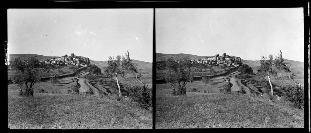 Poble de Talarn elevat en un turó i rodejat de muntanyes. Rafael Degollada i Castanys (Entre 1912 i 1924)